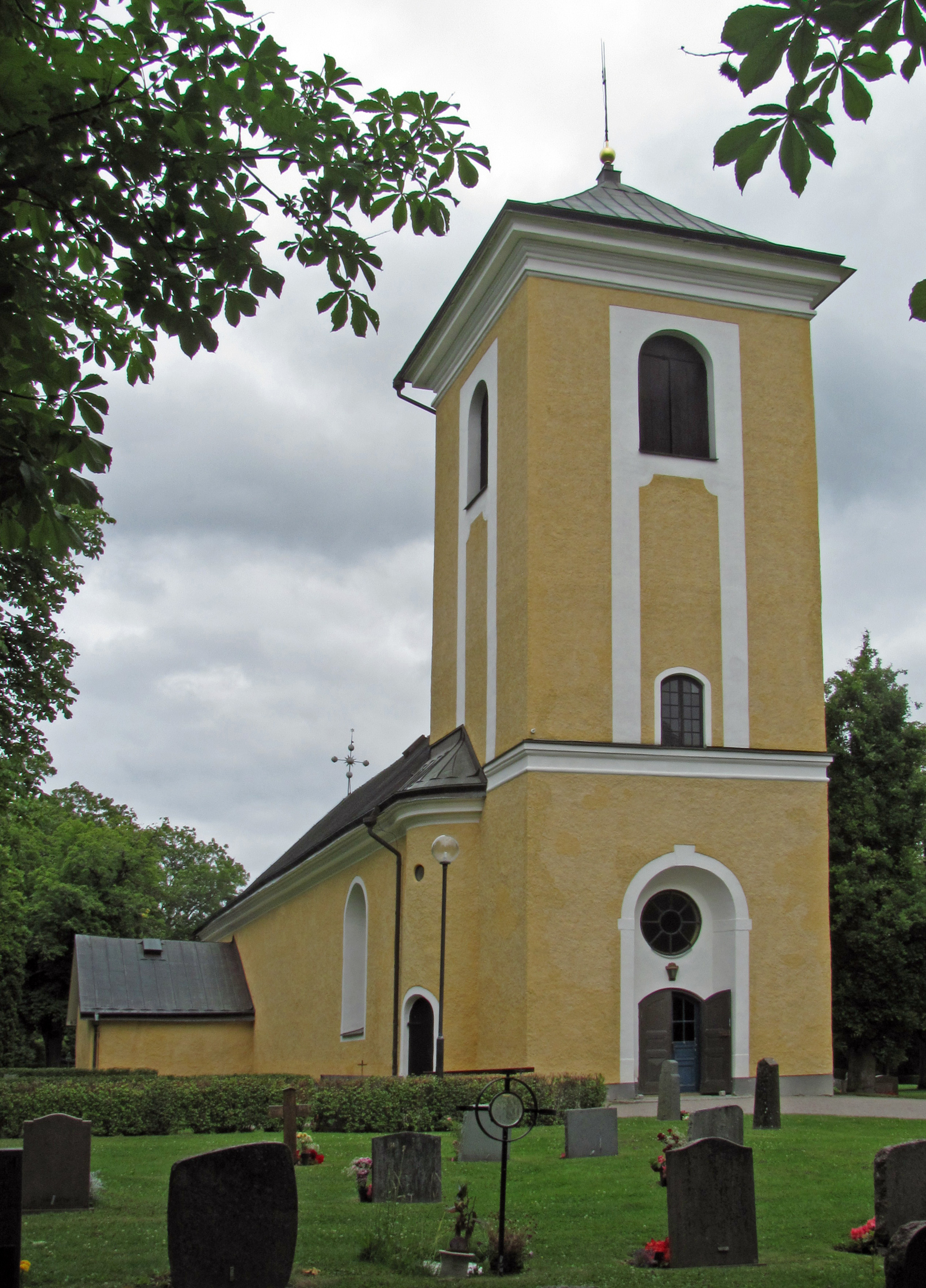 Västerås_Barkarö kyrka